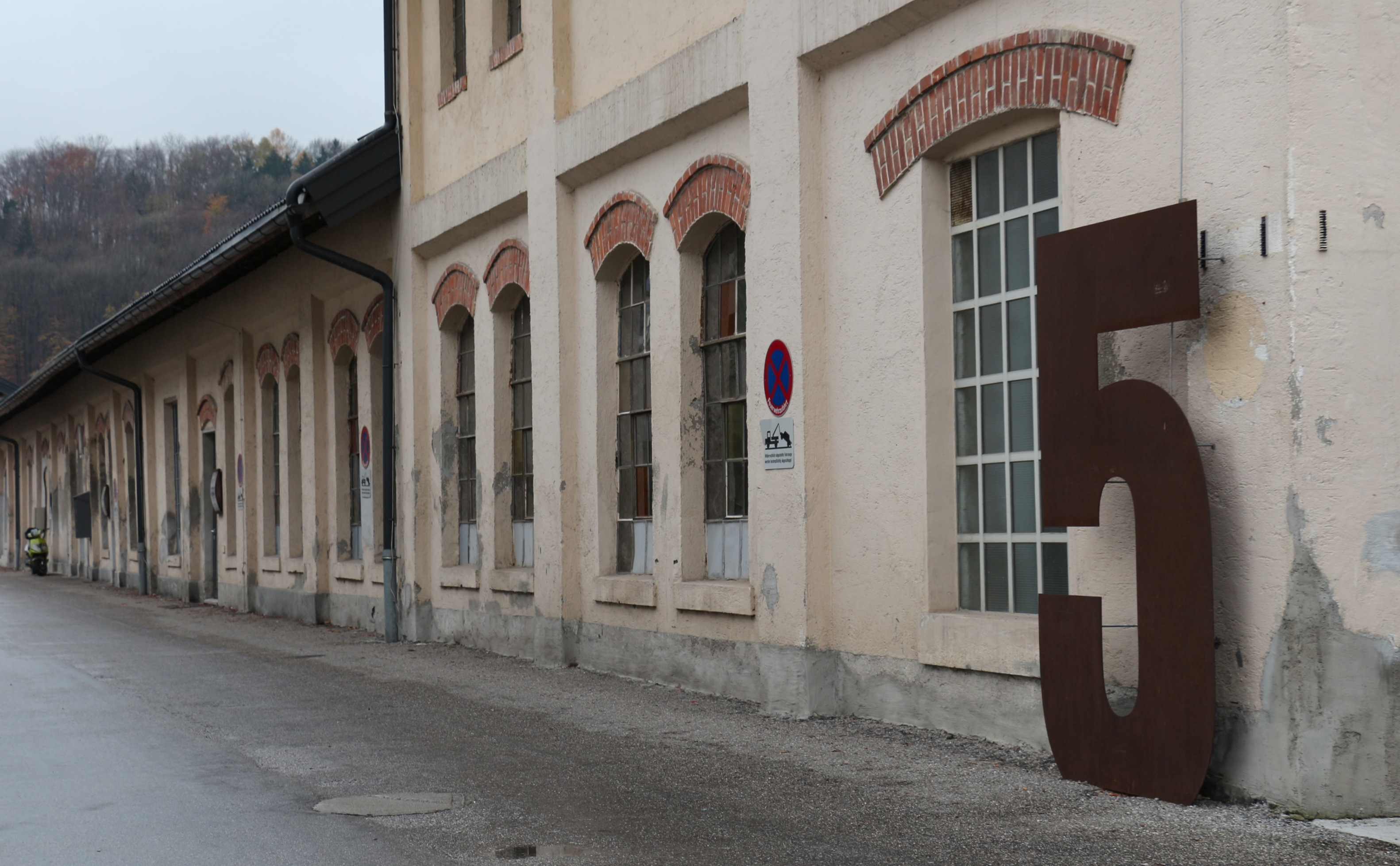 Historisches Bauobjekt des heutigen Gewerbezentrums "Gusswerk" in Salzburg-Kasern